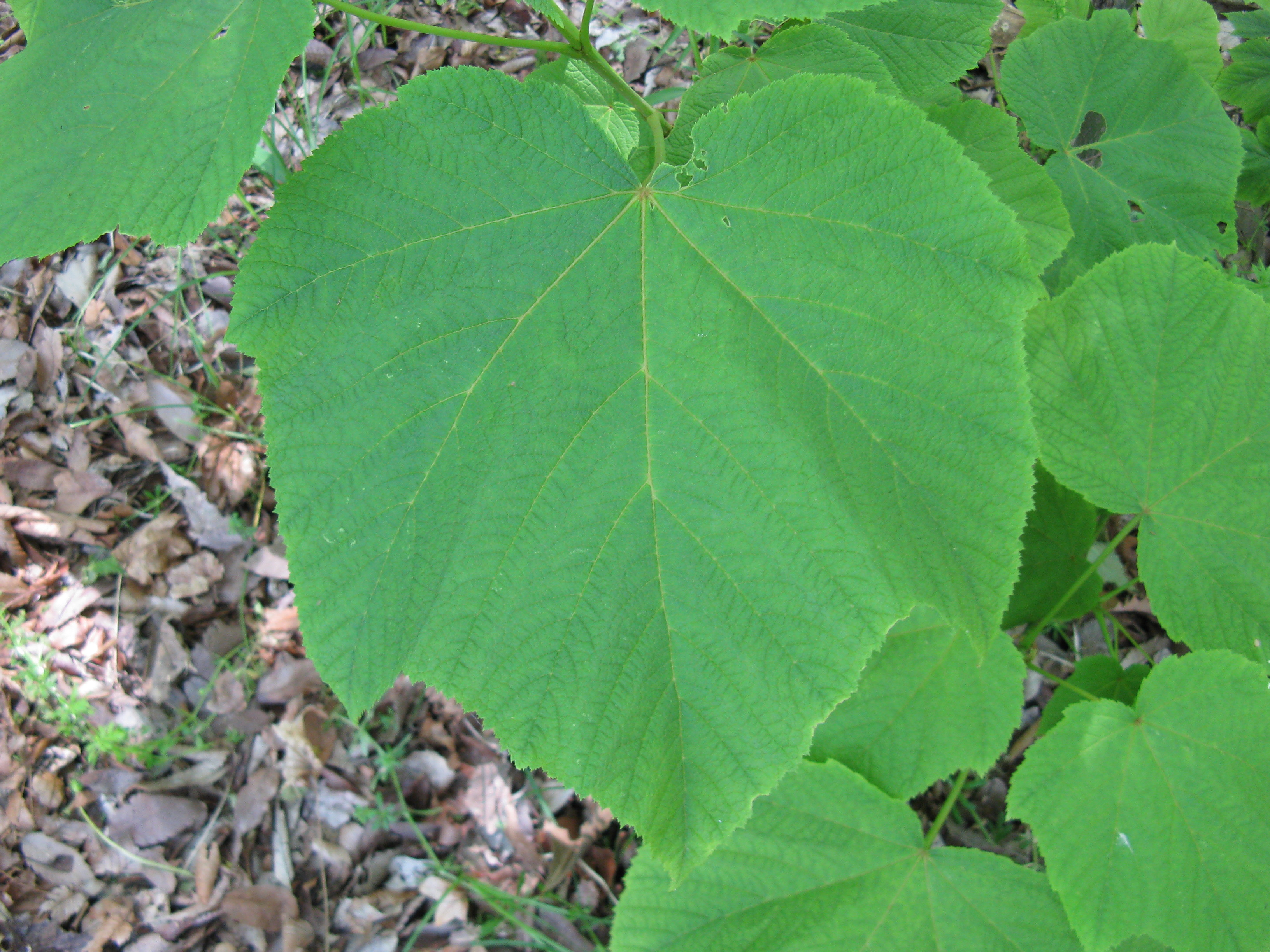 Scientific name Acer nipponicum